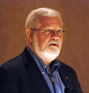 John M. Staudenmaier, S.J. realizó los estudios historicos para rebatir la imagen intelectualista.